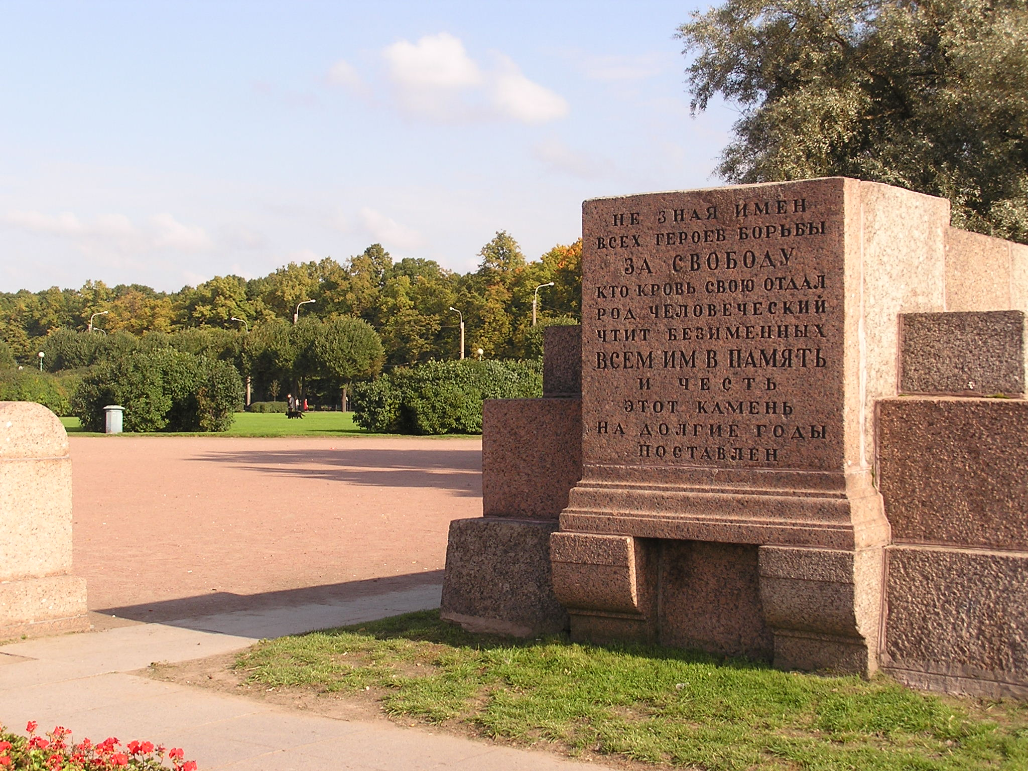 Санкт-Петербург. Марсово поле